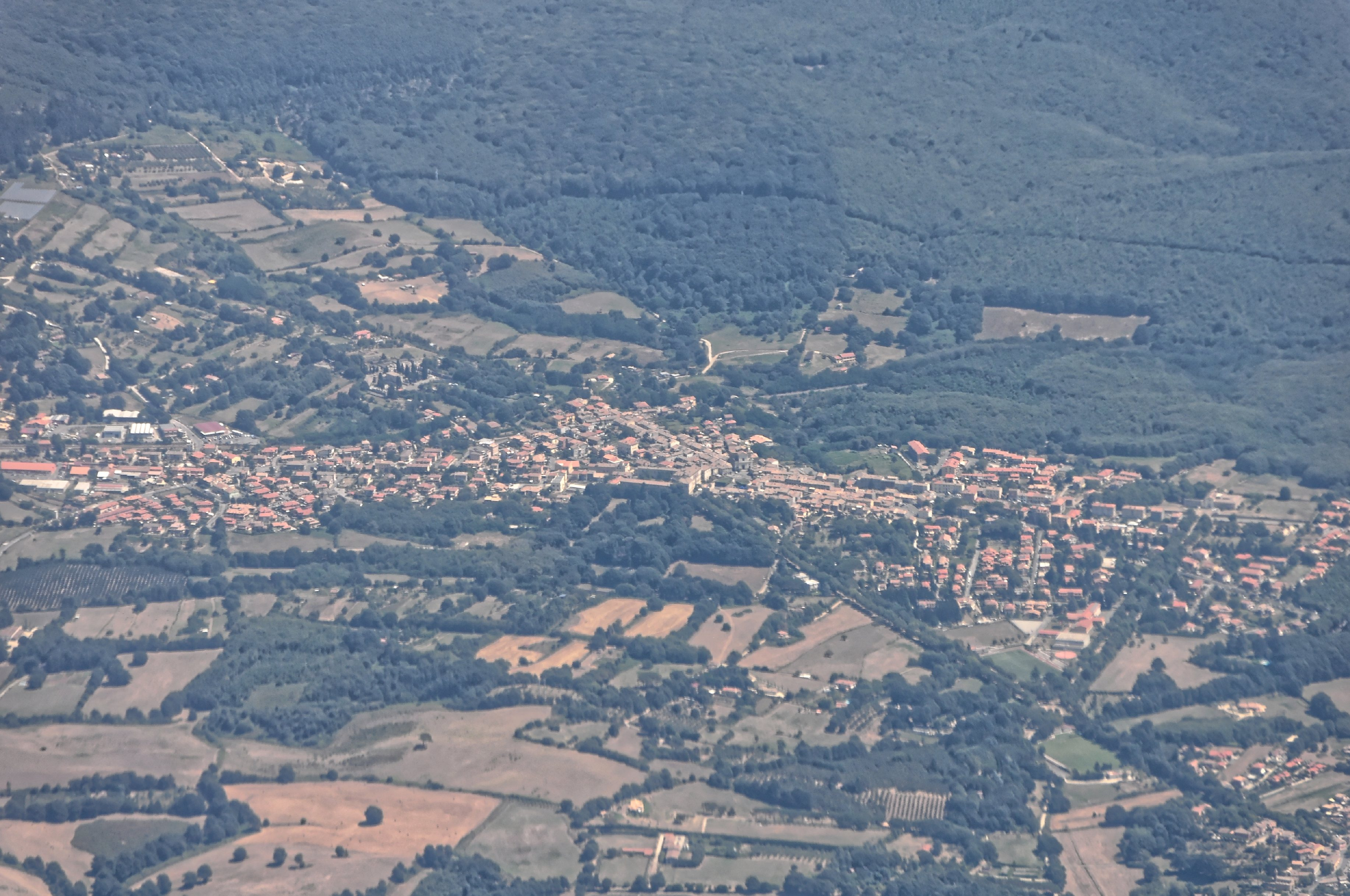 Bilder vom Flug -Rom-Düsseldorf-Hamburg 2013 Dieses Foto entstand in Zusammenarbeit mit Stadtbesichtigungen.de Die Seiten Stadtbesichtigungen.de, der dazugehörige Reise Blog sowie die Facebookseite: Stadtbesichtigungen Rom dürfen dieses Bild für Ihre Veröffentlichungen ohne den Hinweis auf Wikipedia, Commons bzw der Lizenz verwenden. Die Verantwortlichen habe von mir (Ra Boe) die Originaldaten zur freien Verfügung übermittelt bekommen.